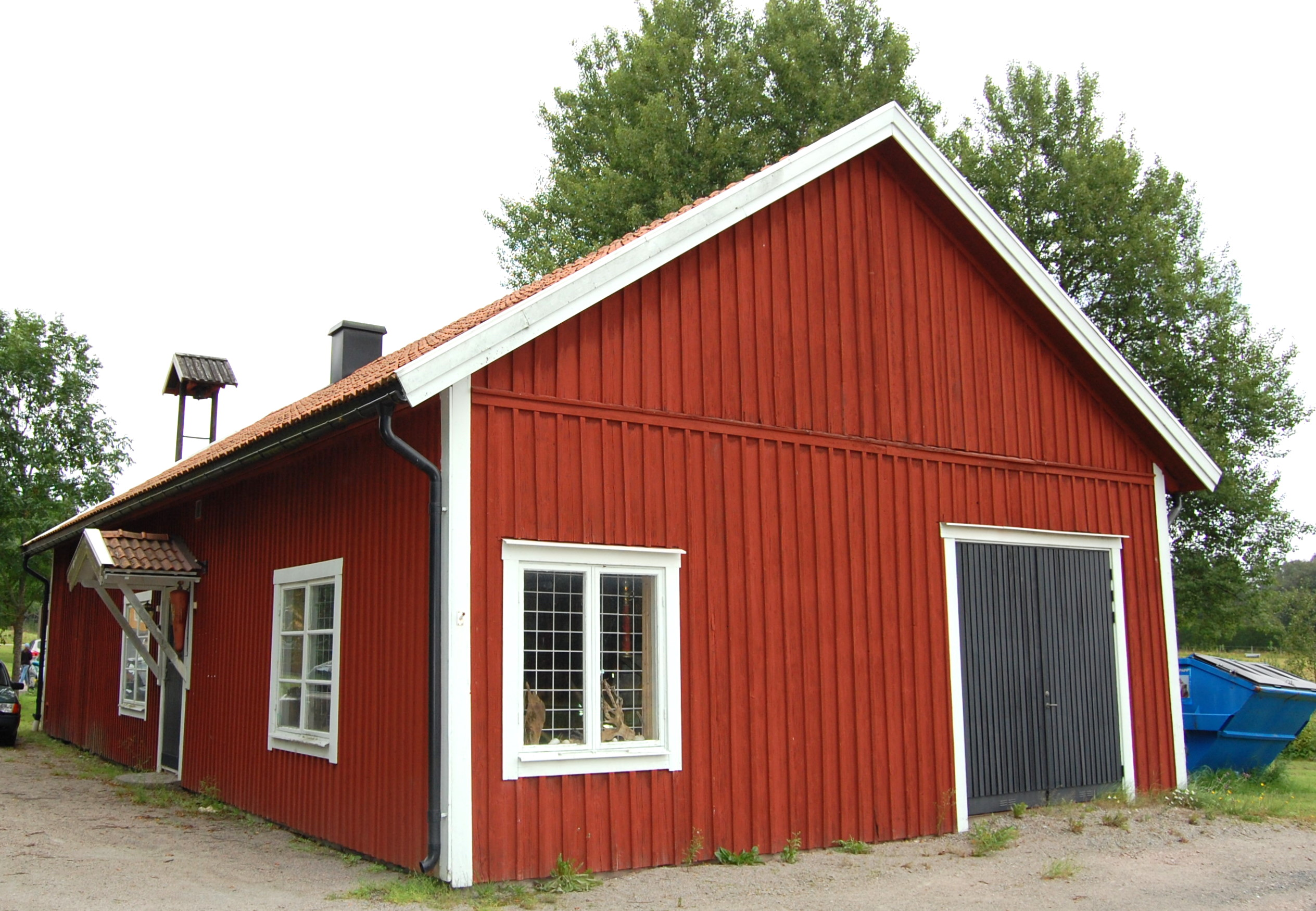 Brandmuseum Sävsjö